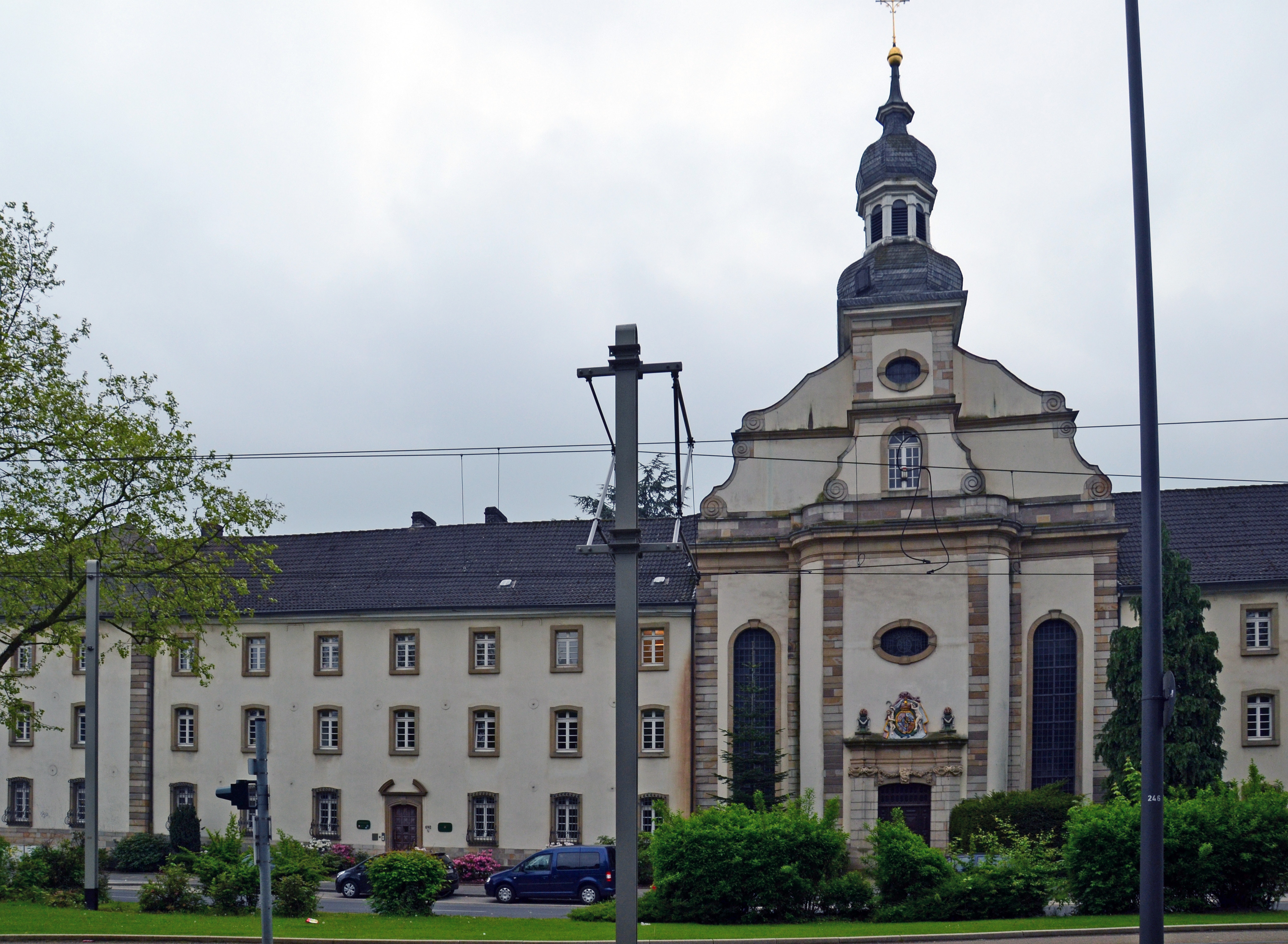 Fürstin-Franziska-Christine-Stiftung in Essen-Steele